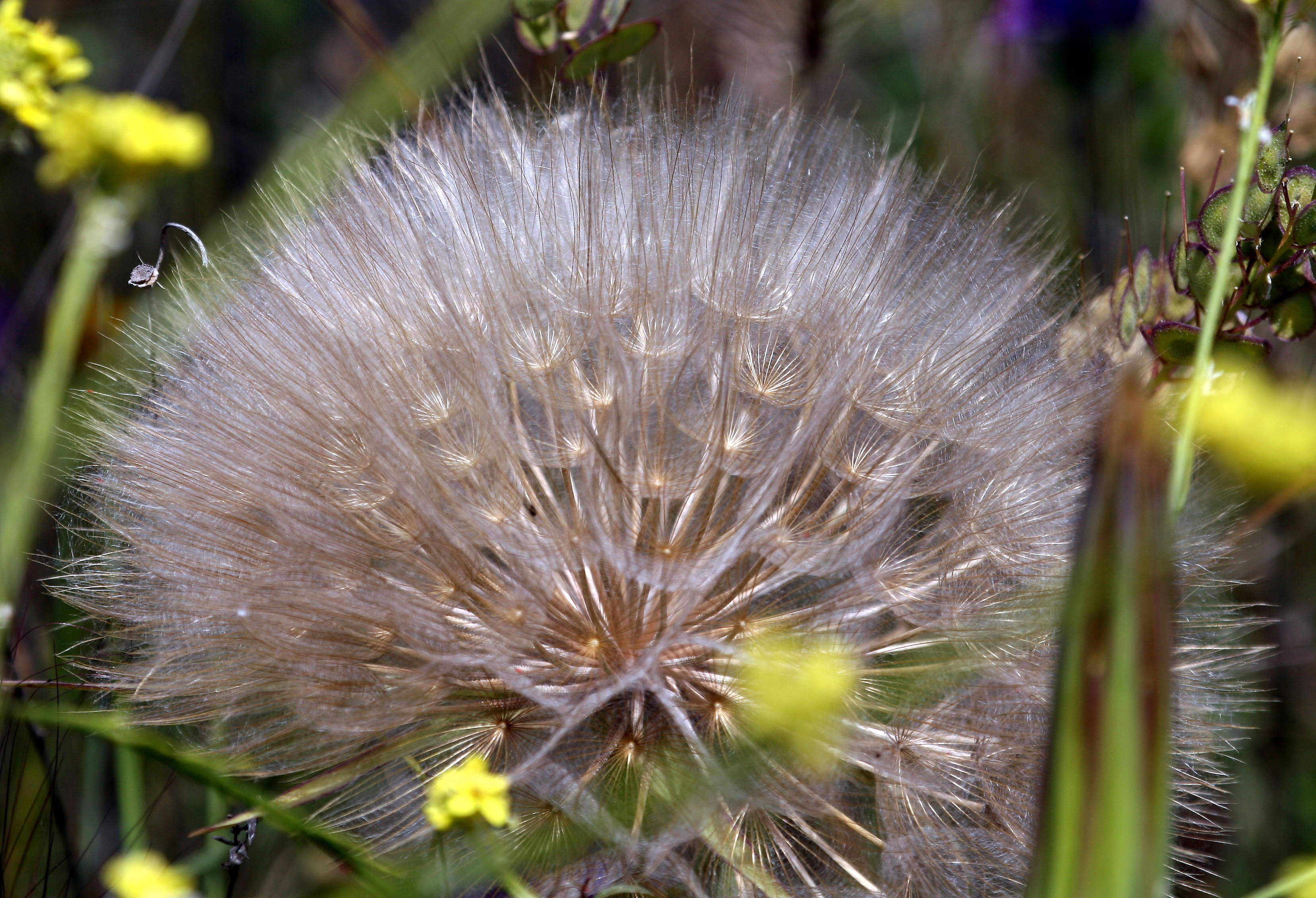 Tragopogon porrifolius (Barba de Cabra) : Capítulo post antesis; detalle de las cipselas - Prado de Rejas (Madrid).